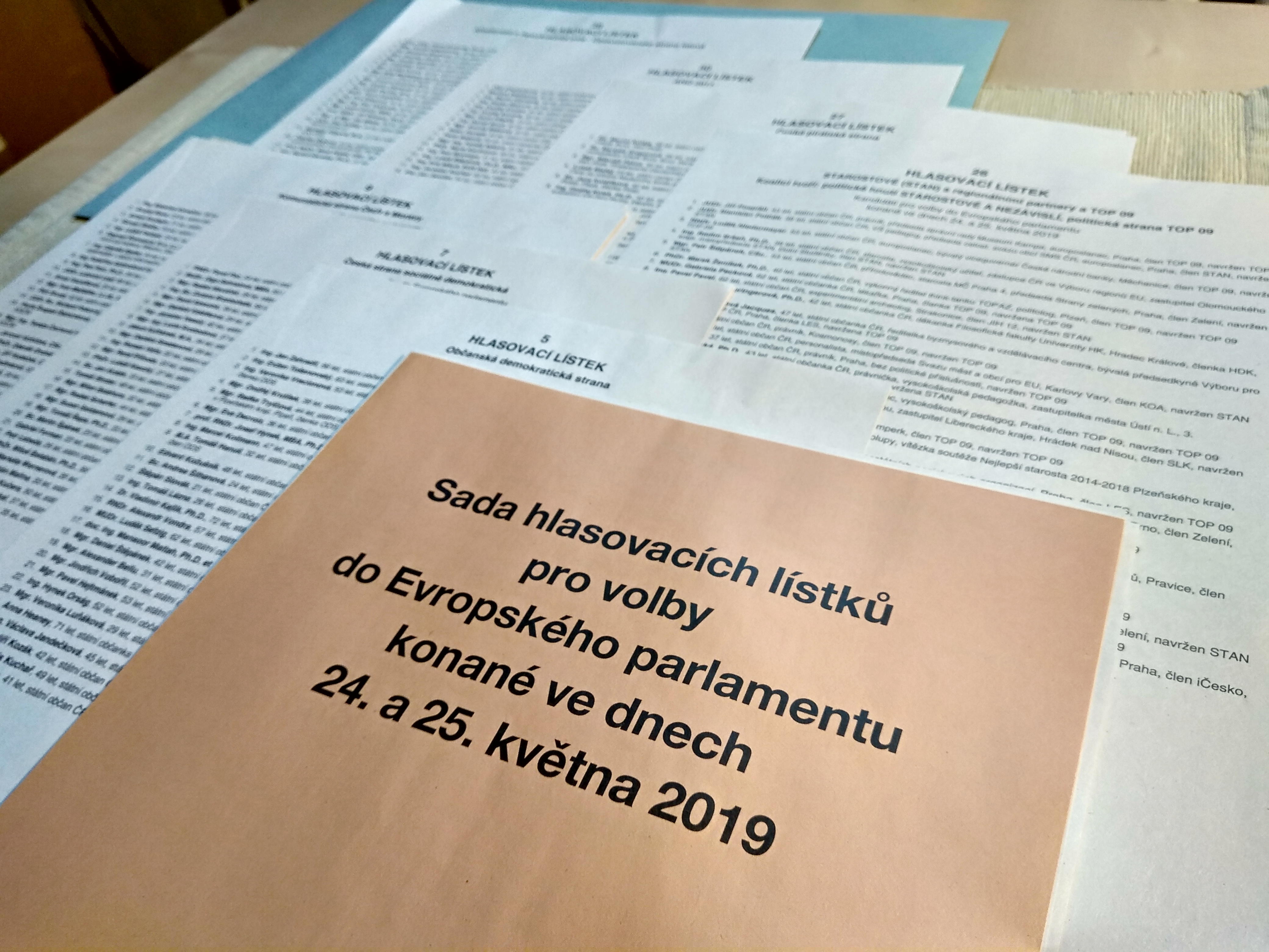 Sada hlasovacích lístků pro volby do Evropského parlamentu konané ve dnech 24. a 25. května 2019. Úvodní list a výběr sedmi nejrelevantnějších kandidujících stran (dle obvyklých předvolebních průzkumů a mediálních debat).